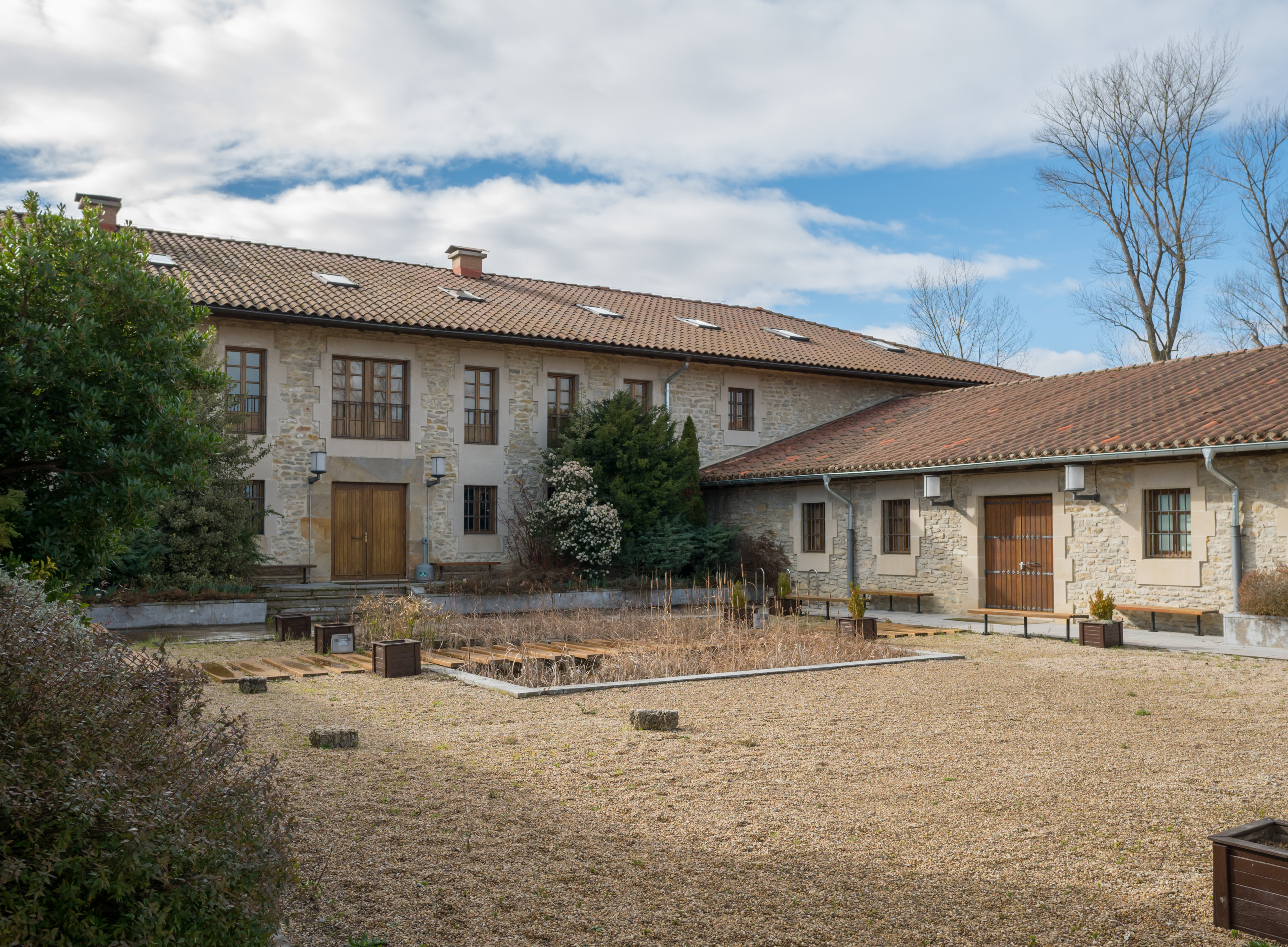 Patio de la Casa de la Dehesa en las Campas de Olarizu. Vitoria-Gasteiz, País Vasco, España.